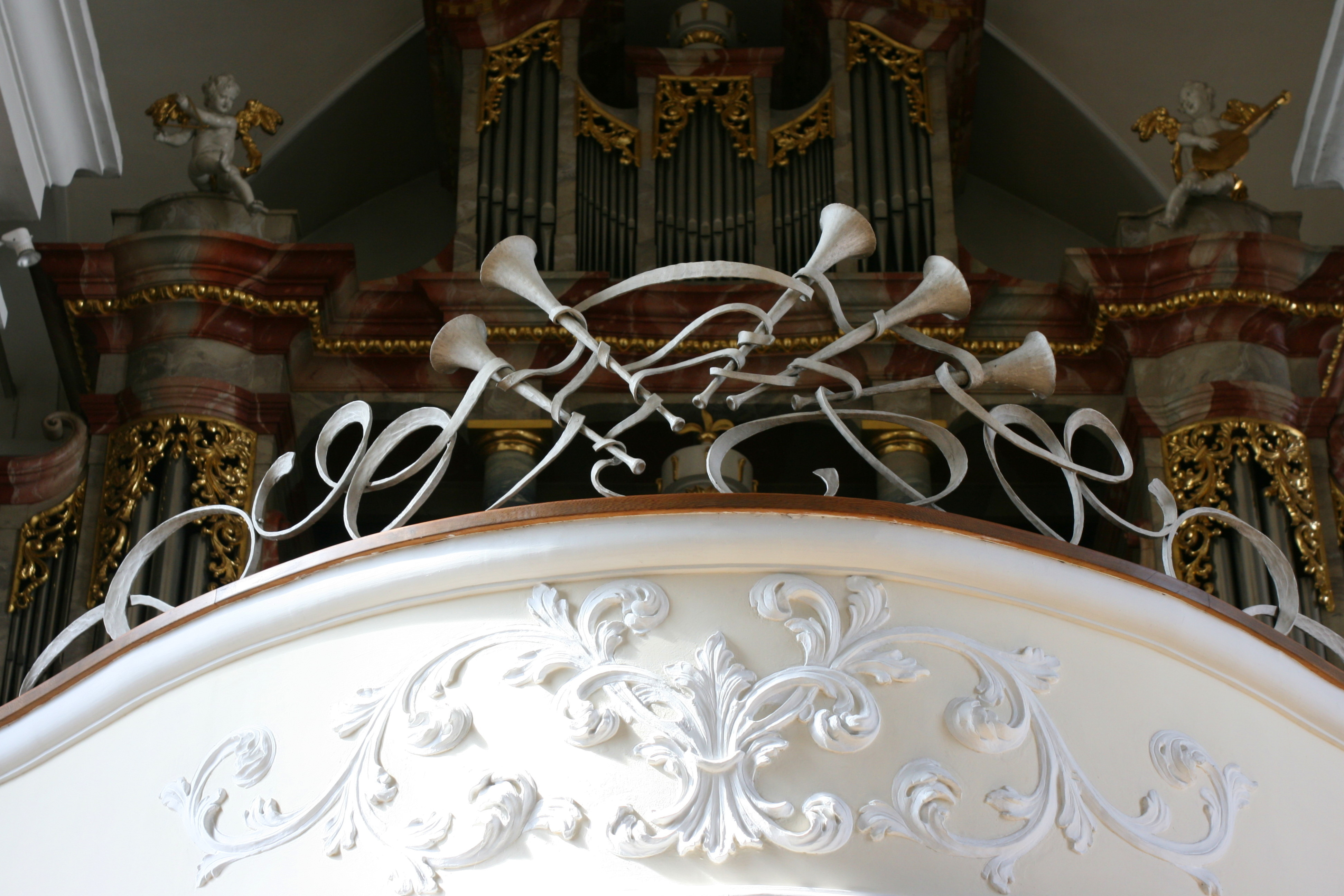 Pfarrkirche St. Martin, Marktplatz in Langenargen